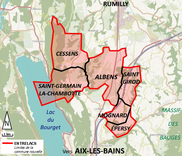 Fusion de six communes de Savoie en une commune nouvelle : Entrelacs.